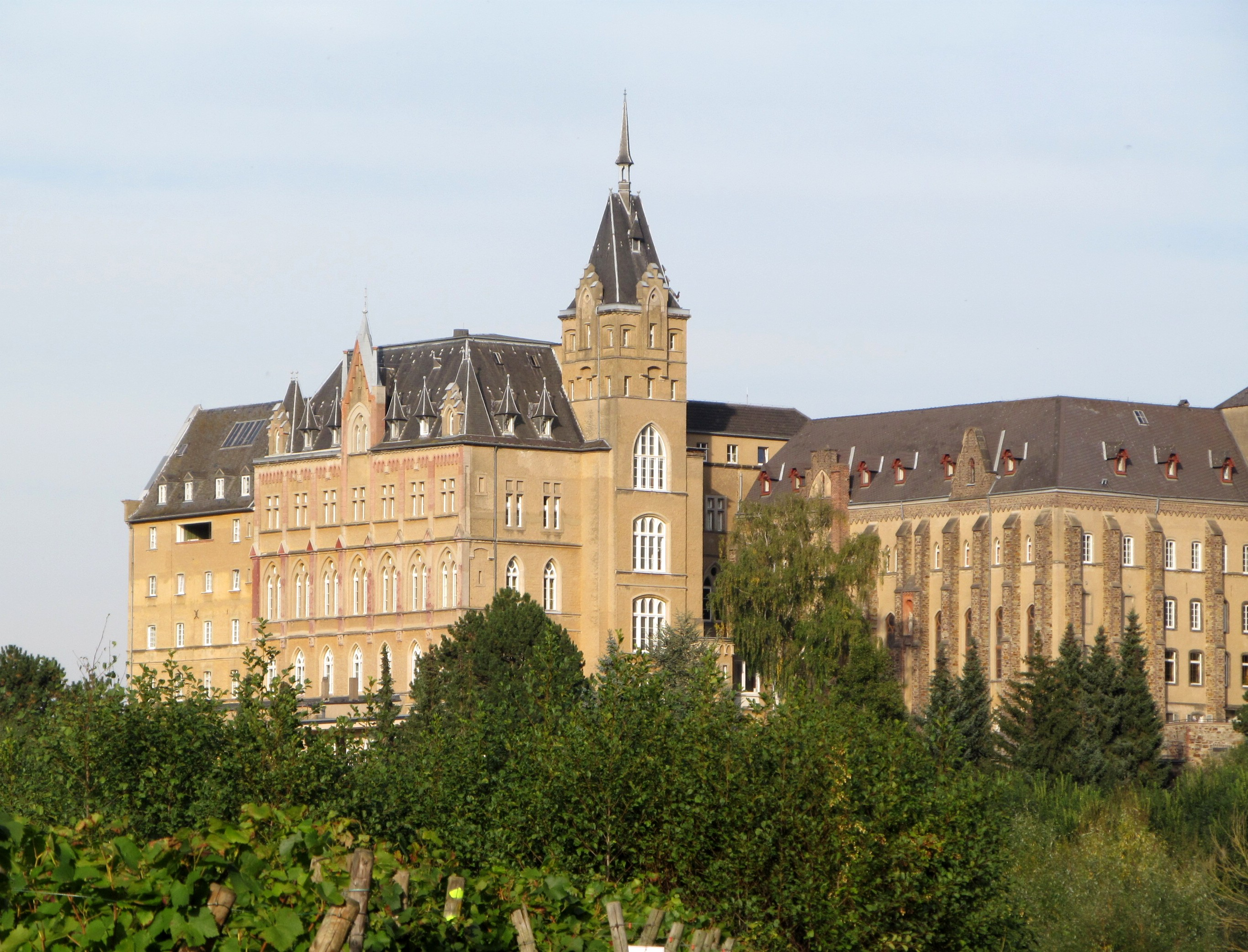 Kloster Kalvarienberg in Ahrweiler, Ansicht von Westen